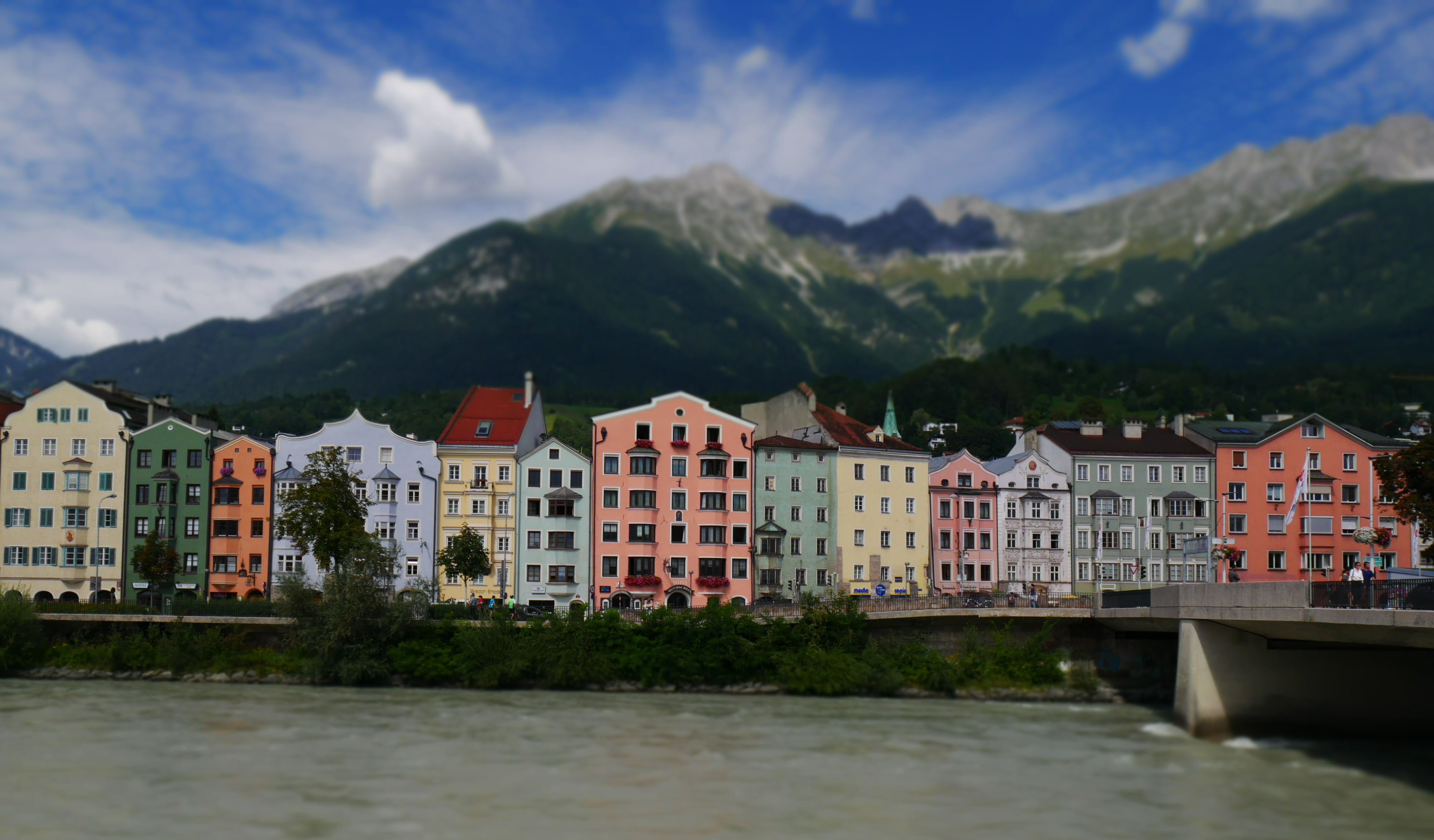 Innsbruck: complesso di case nei pressi dell'Inn Brücke